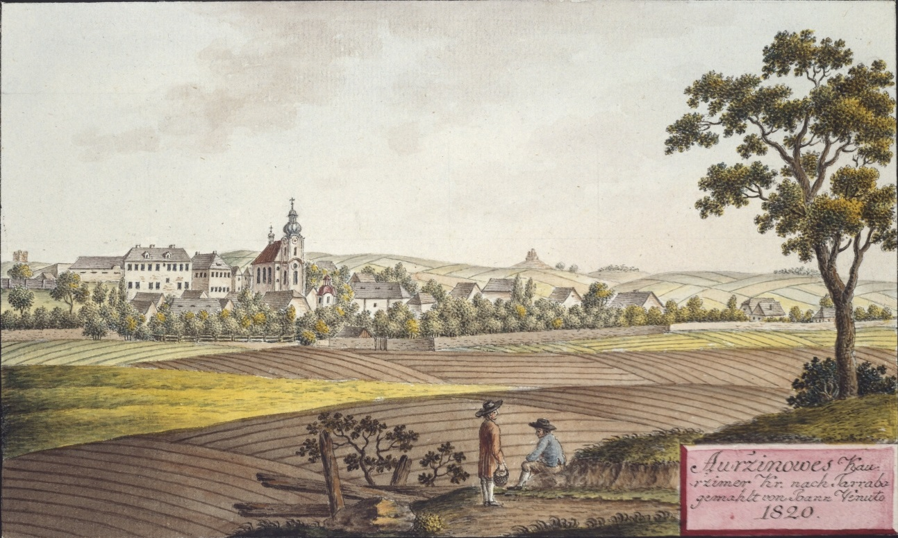 Hříněves. Auržinowes Kaurzimer Kr. nach Tarraba gemahlt von Joann Venuto